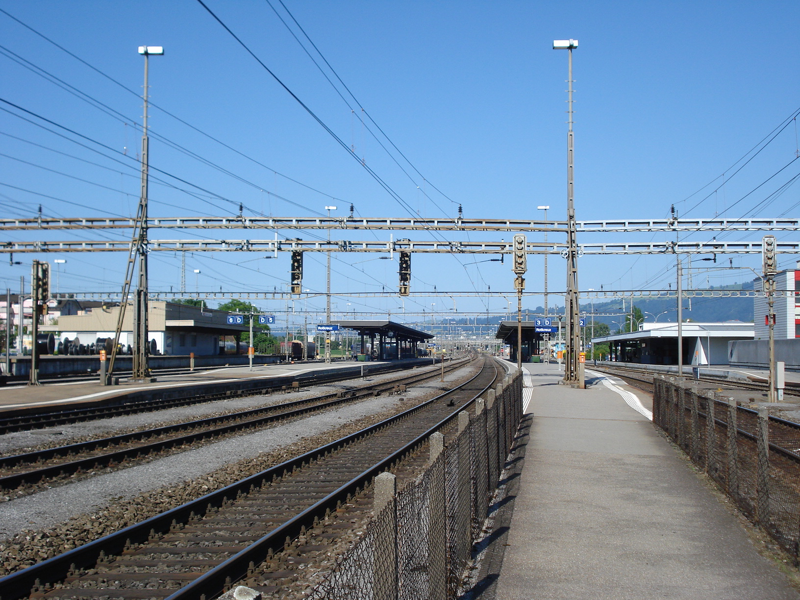 Bahnhof Rotkreuz von Südwesten